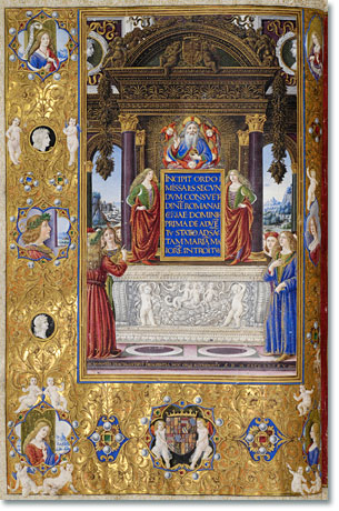 missel de Mathias Corvin conservé a la bibliotheque royale de belgique